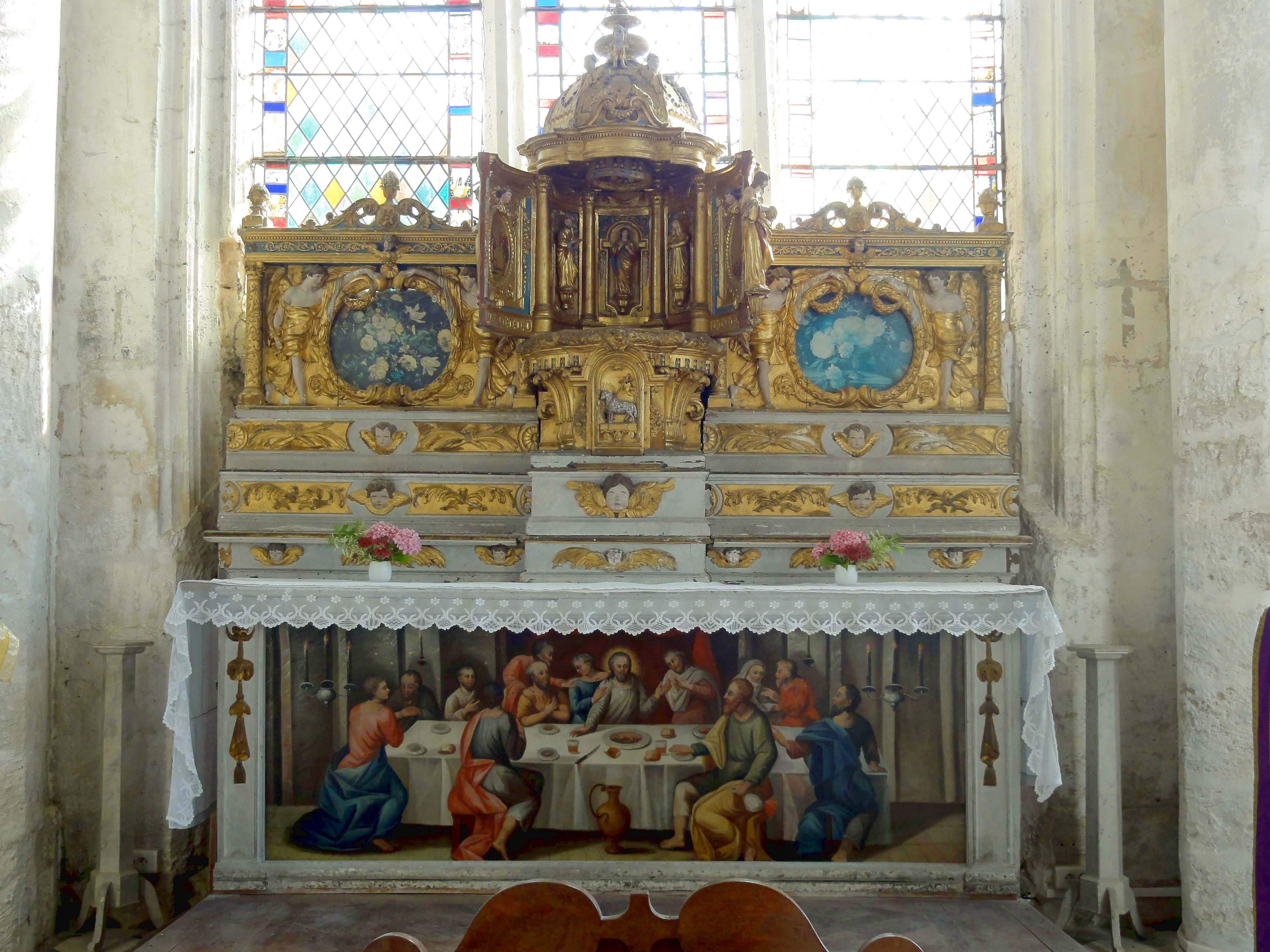 Mobilier de l'église - voir titre.